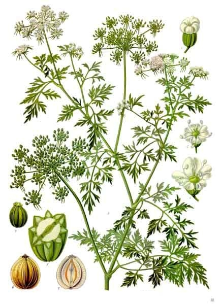 Hundspetersilie. A blühende Pflanze. 1 Randblüte einer Dolde; 2 Blüte aus dem Inneren der Dolde; 3 Fruchtknoten; 4 Frucht; 5 dieselbe im Querschnitt. A natürliche Grösse, 1—5 vergrössert.